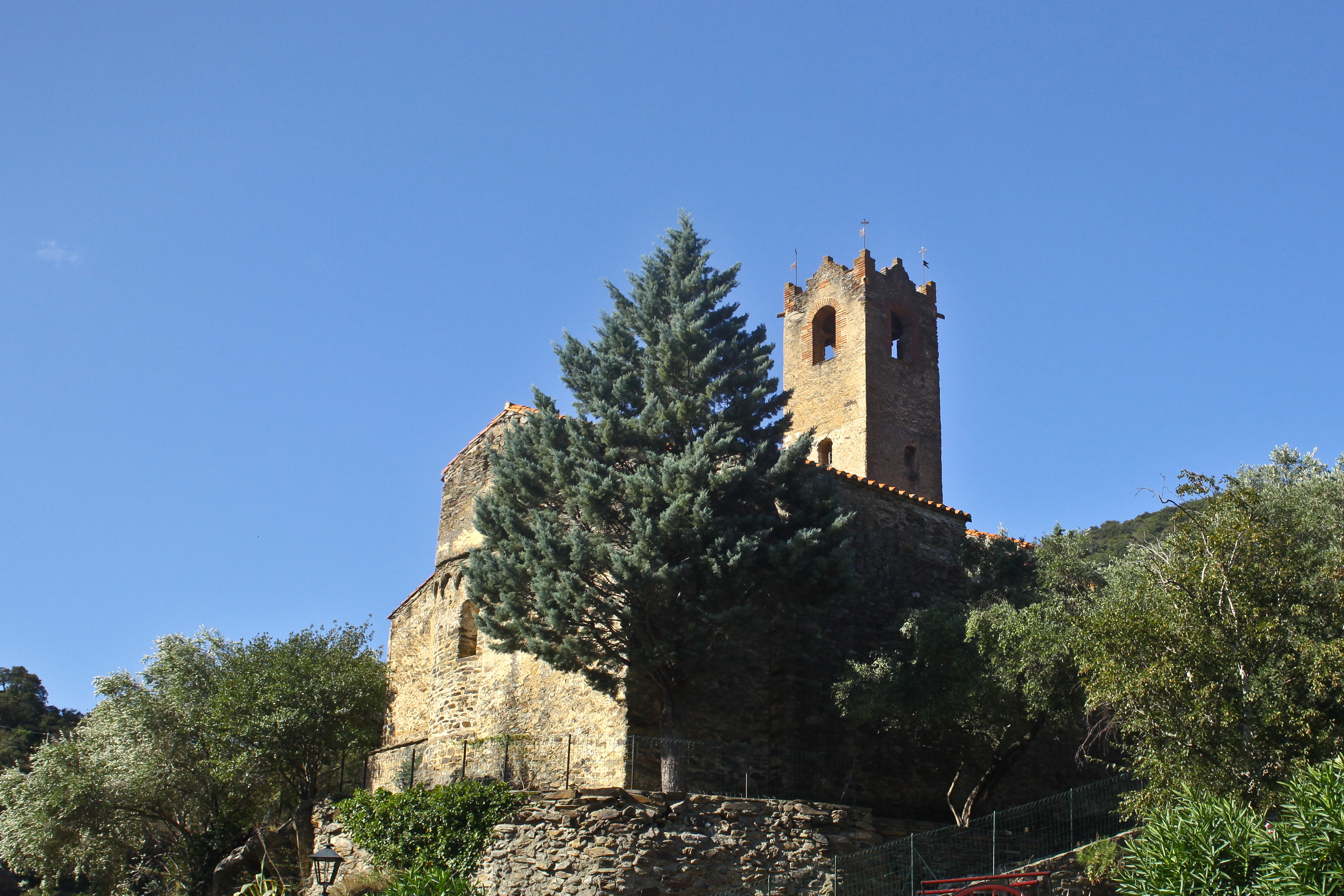 Église de Saint-Michel-de-Llotes, face nord .